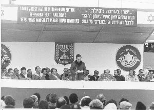 טקס הנחת הפס הראשון במסילה באר שבע אילת